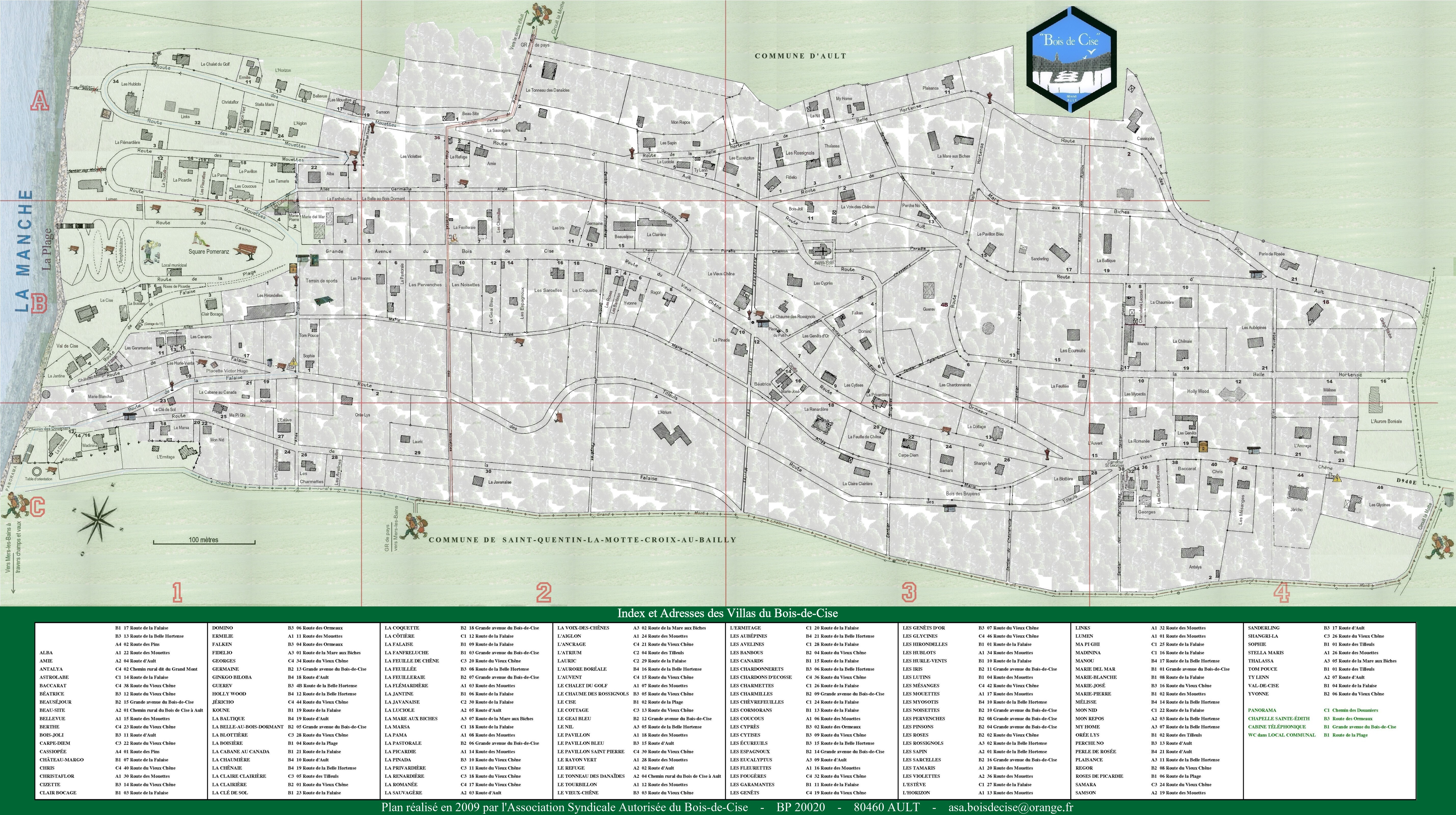 Plan du Bois-de-Cise avec l'adresse des villas.